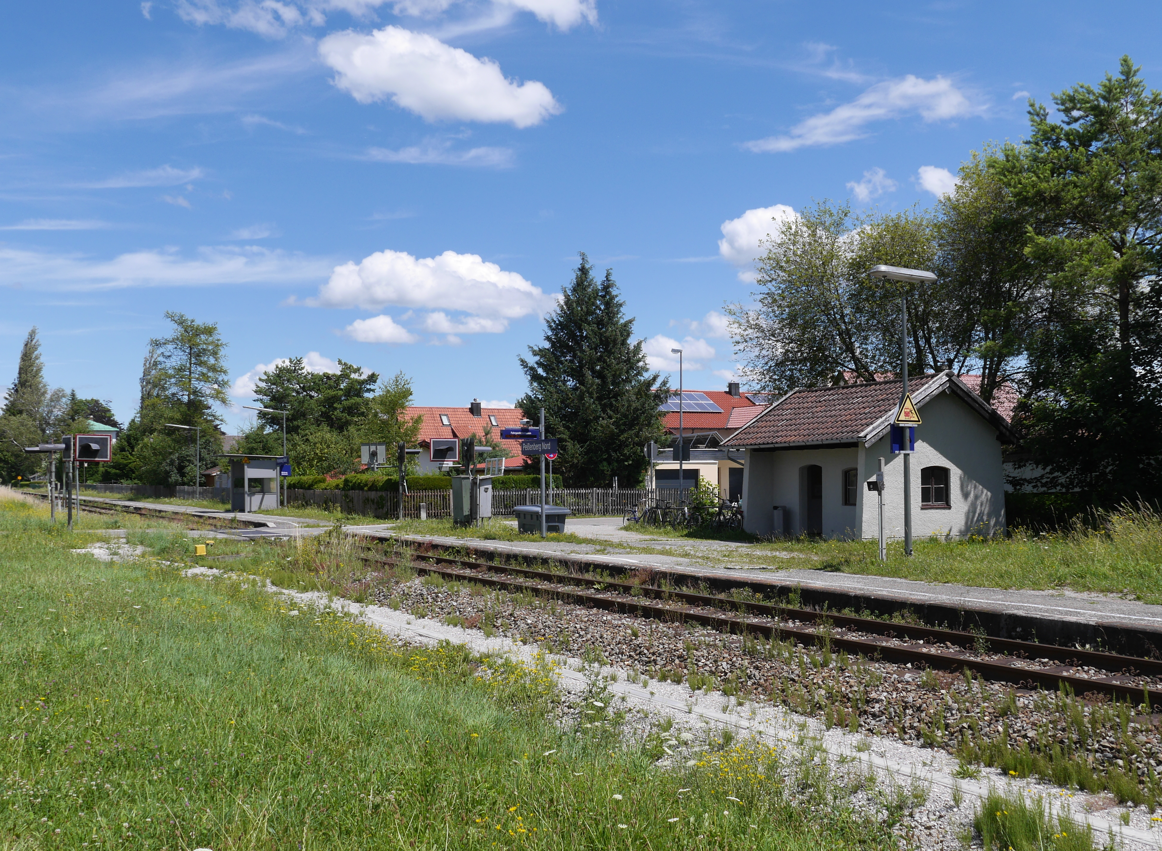 Haltepunkt Peißenberg Nord an der Bahnstrecke Weilheim–Peißenberg mit durch einen Bahnübergang zweigeteiltem Bahnsteig, rechts das Wartehäuschen, links ist über der Blinklichtanlage das alte Empfangsgebäude des Bahnhofs Unterpeißenberg zu erkennen